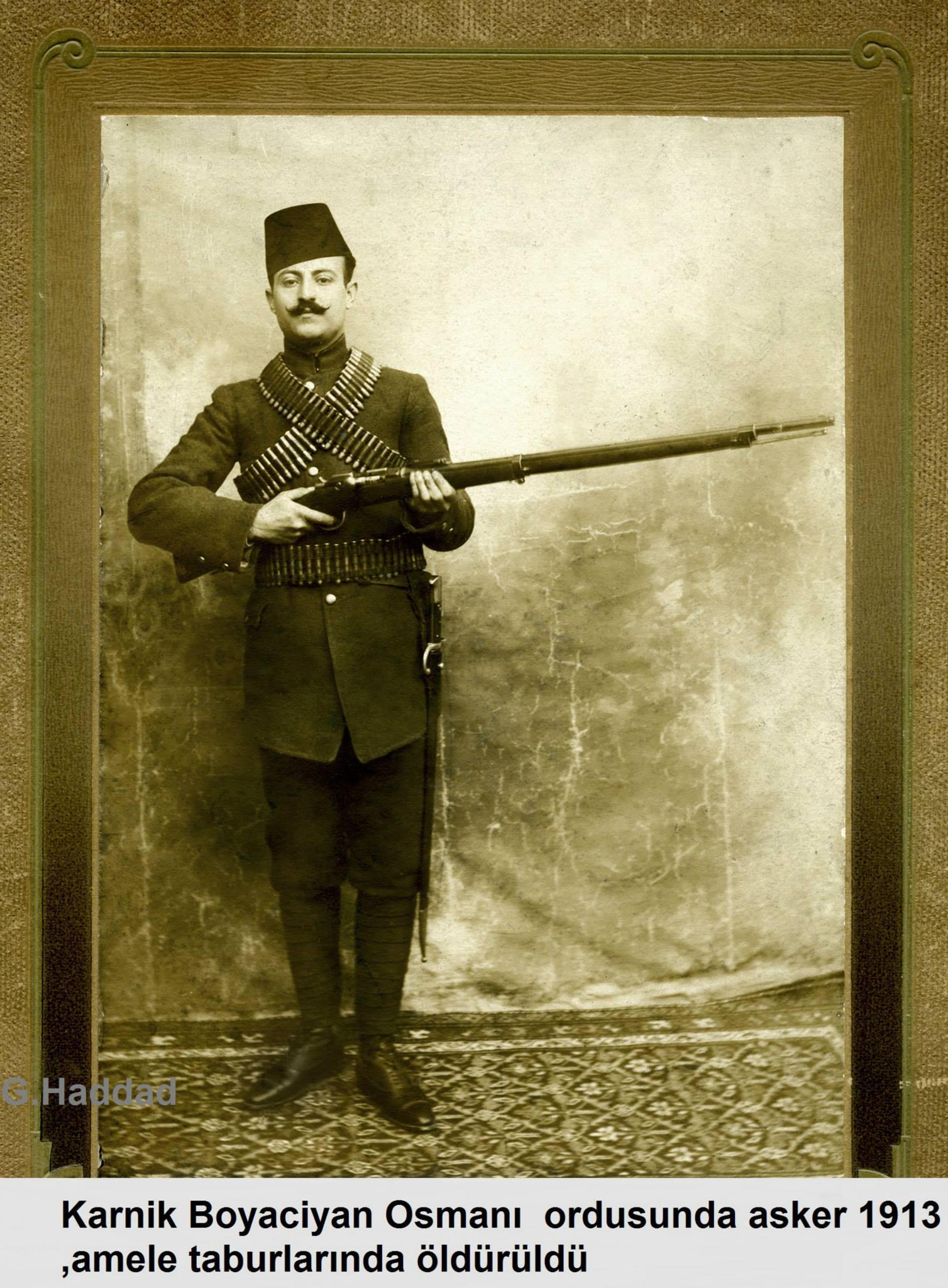 Ulupınar Ermeni köylüsü / Arevmedyan'da alıntı